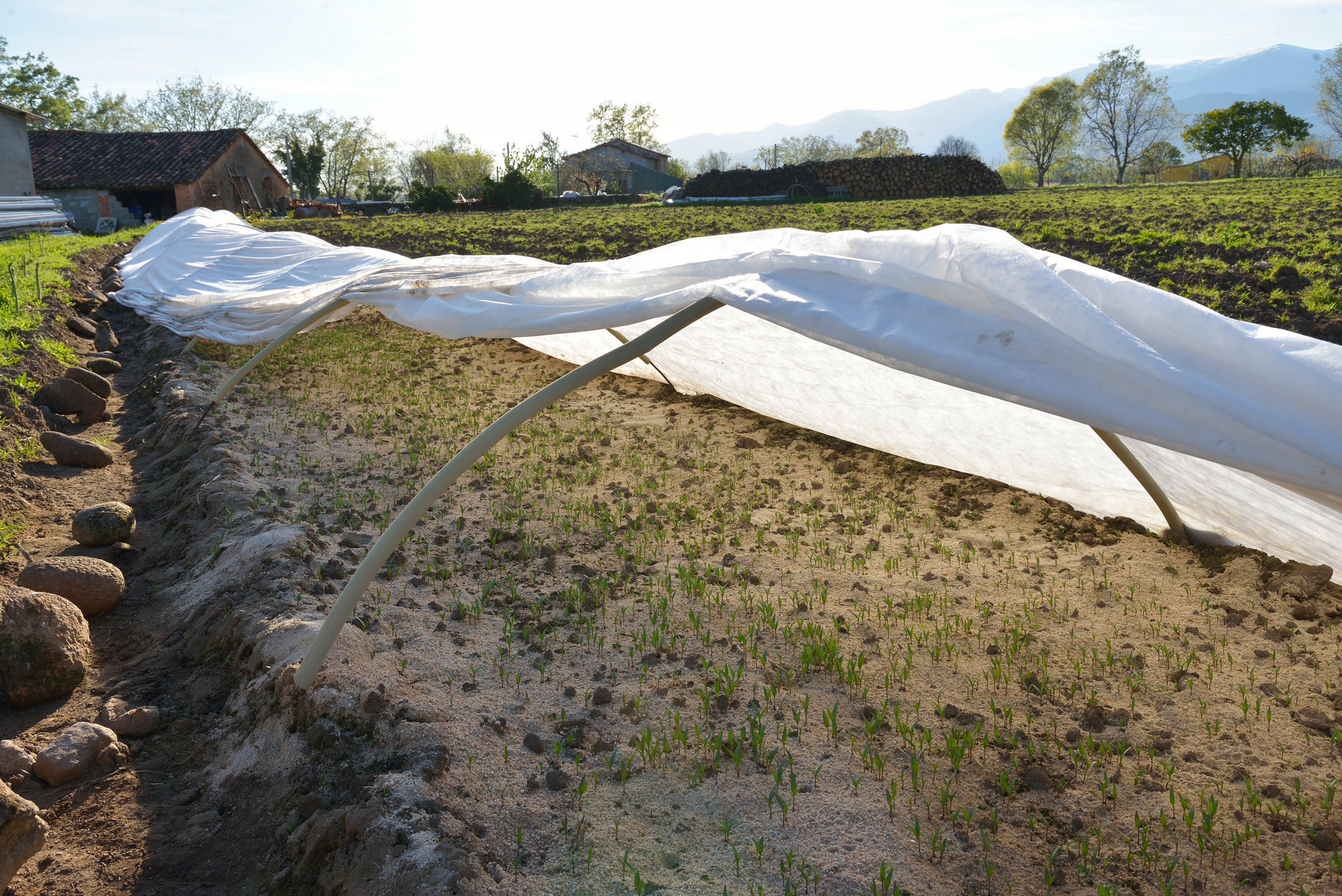 Semilleros para la elaboración de pimentón ahumado de Candeleda